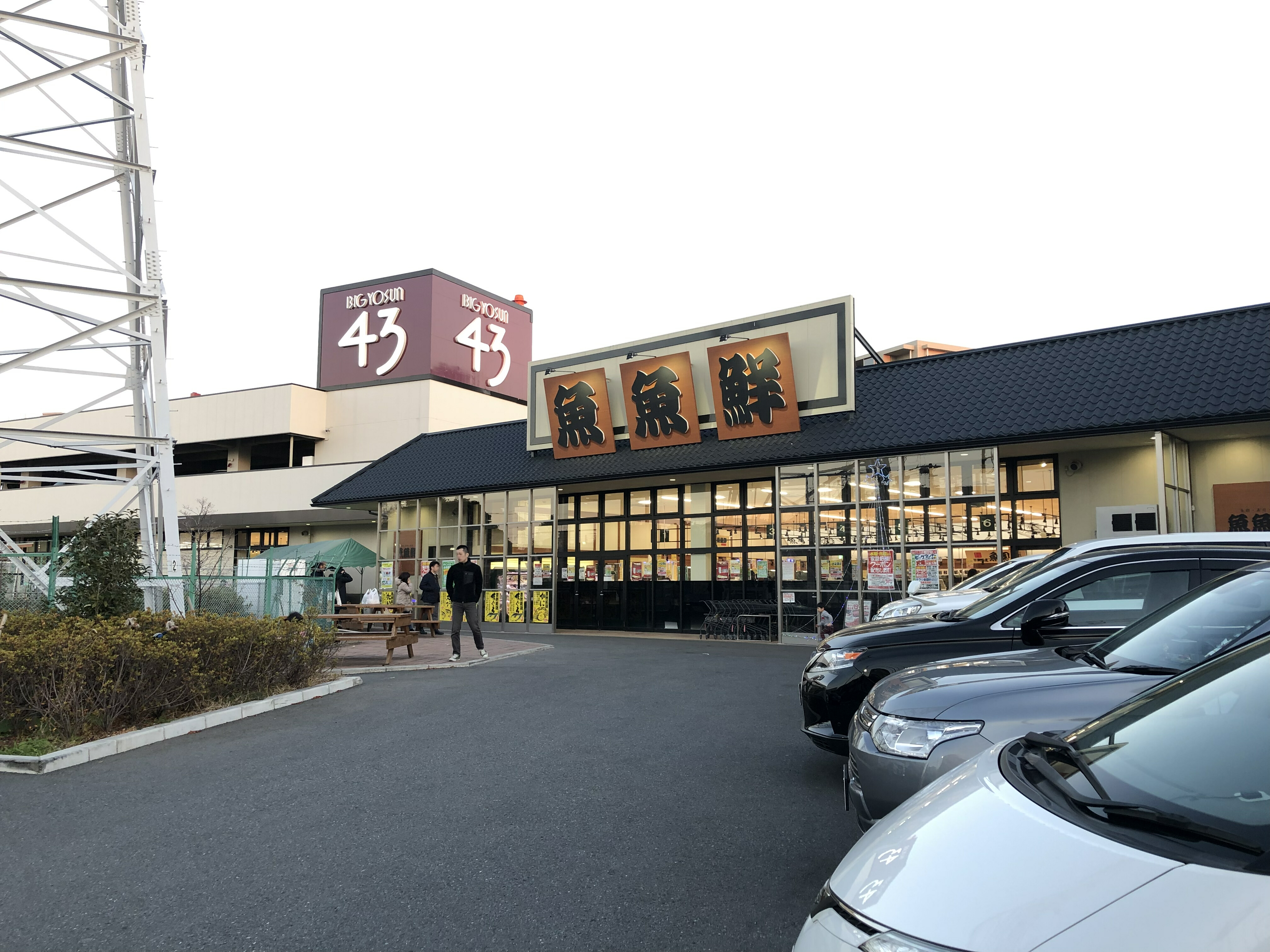 ビッグヨーサン鶴見店の隣にある魚々鮮の外観。